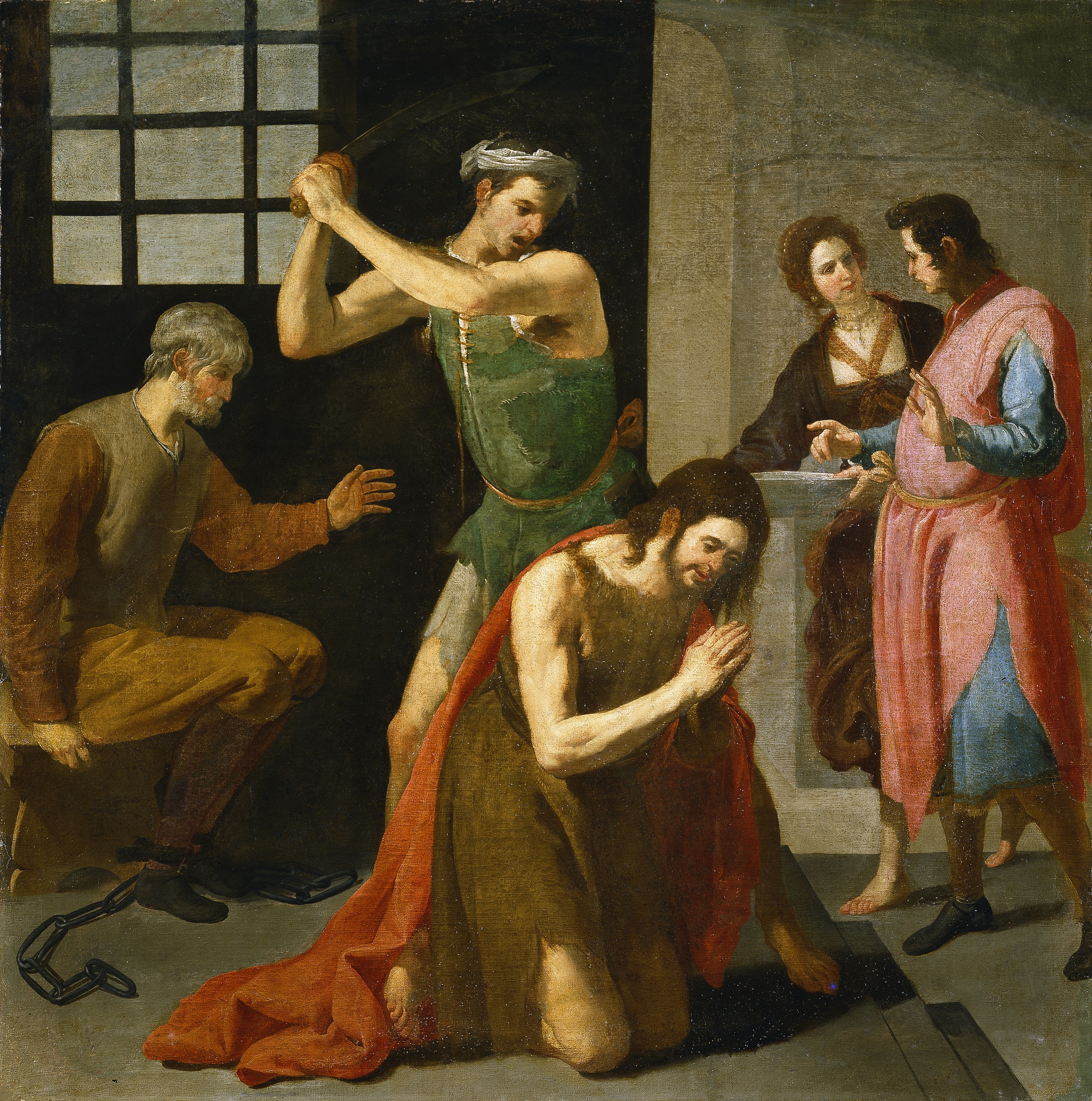 La obra representa la decapitación del profeta San Juan Bautista, que murió por orden del rey Herodes Antipas.